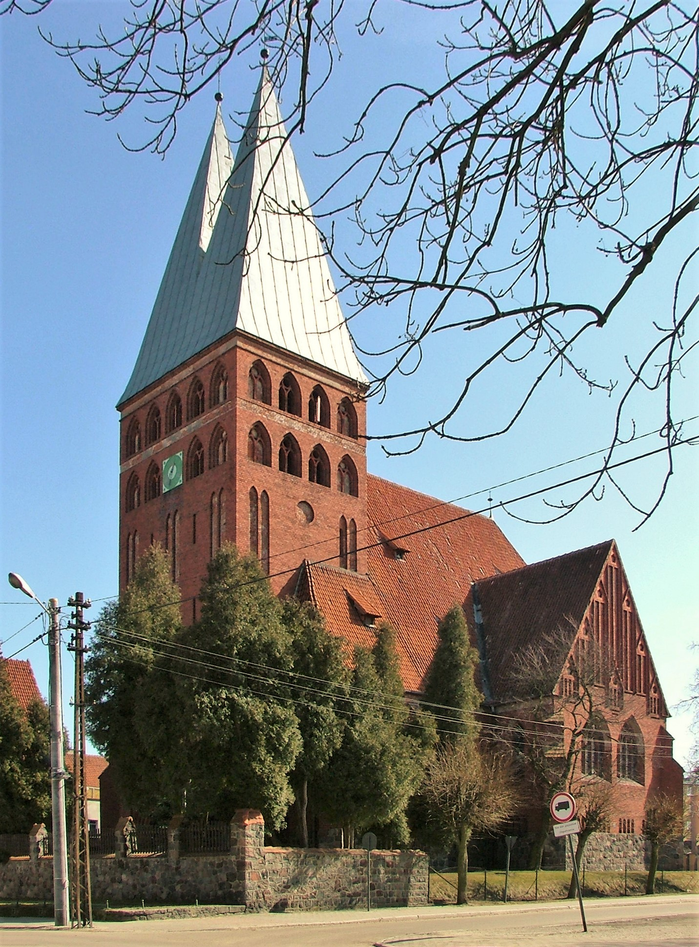 Ostróda, ul. Sienkiewicza - kościół ewangelicki, budowla neogotycka, obecnie własność Kościoła ewangelicko-metodystycznego, współużytkowany przez parafię ewangelicko-augsburską. (zabytek nr 1961 z 14.08.1987 i A-526 z 22.08.1960)